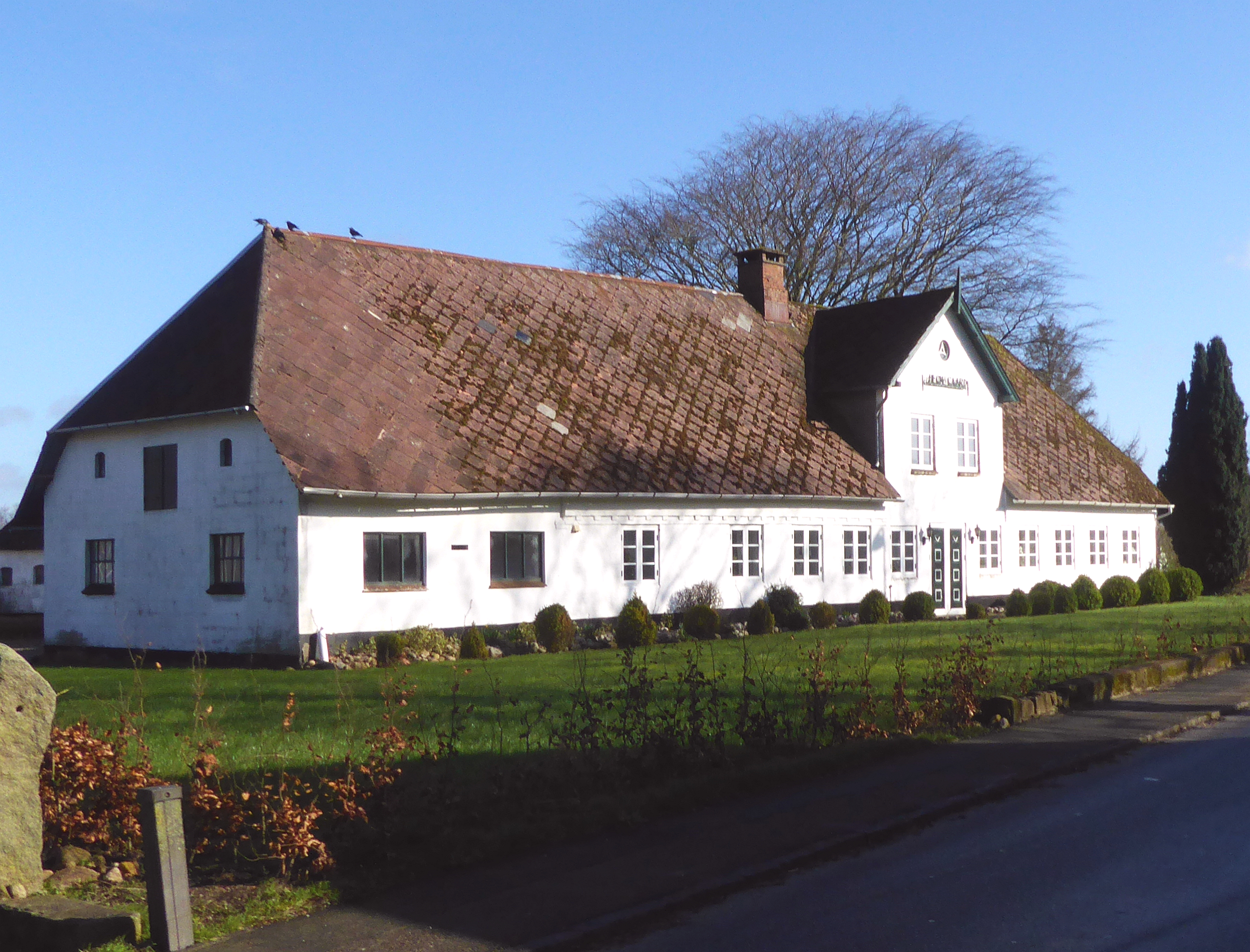 Altes Anwesen in der Gemeinde Bolderslev im Kirchsoiel Bjolderup Sogn, Syddanmark - Foto Wolfgang Pehlemann P1350983